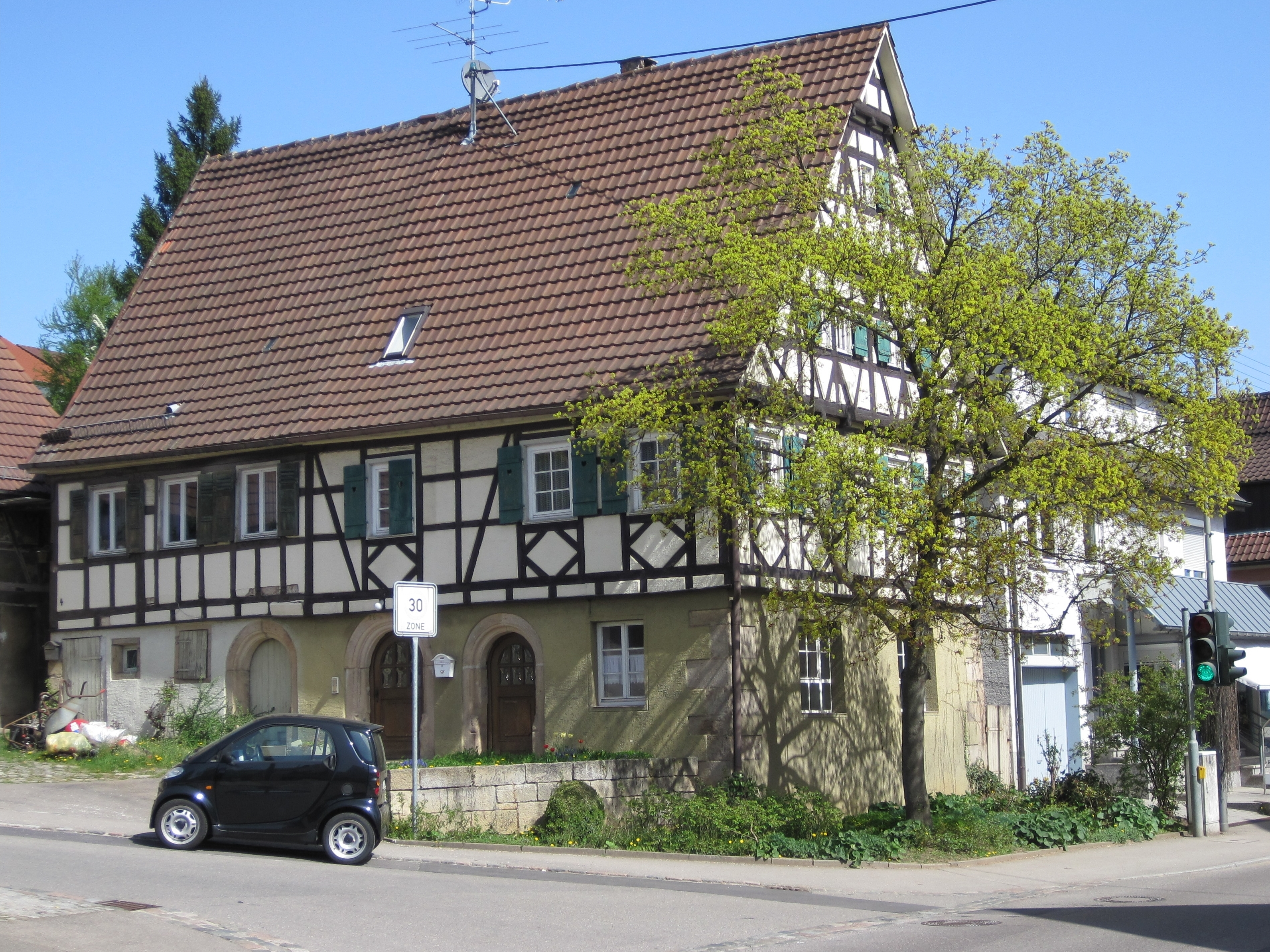 Fachwerkhaus in Aichtal-Aich